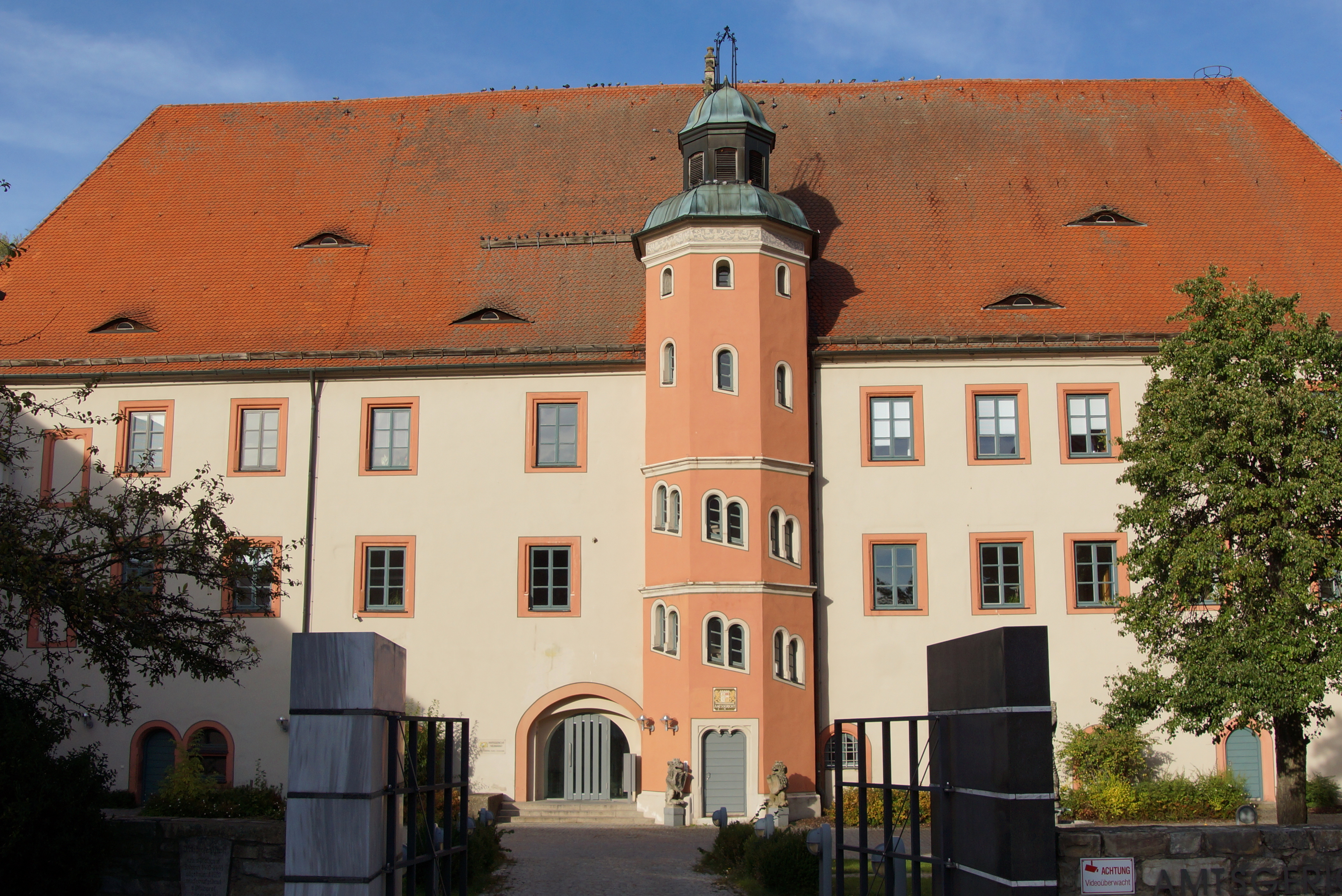 Das Pfalzgräfliche Schloß am Hofplan, heute Residenzplatz, in Neumarkt in der Oberpfalz